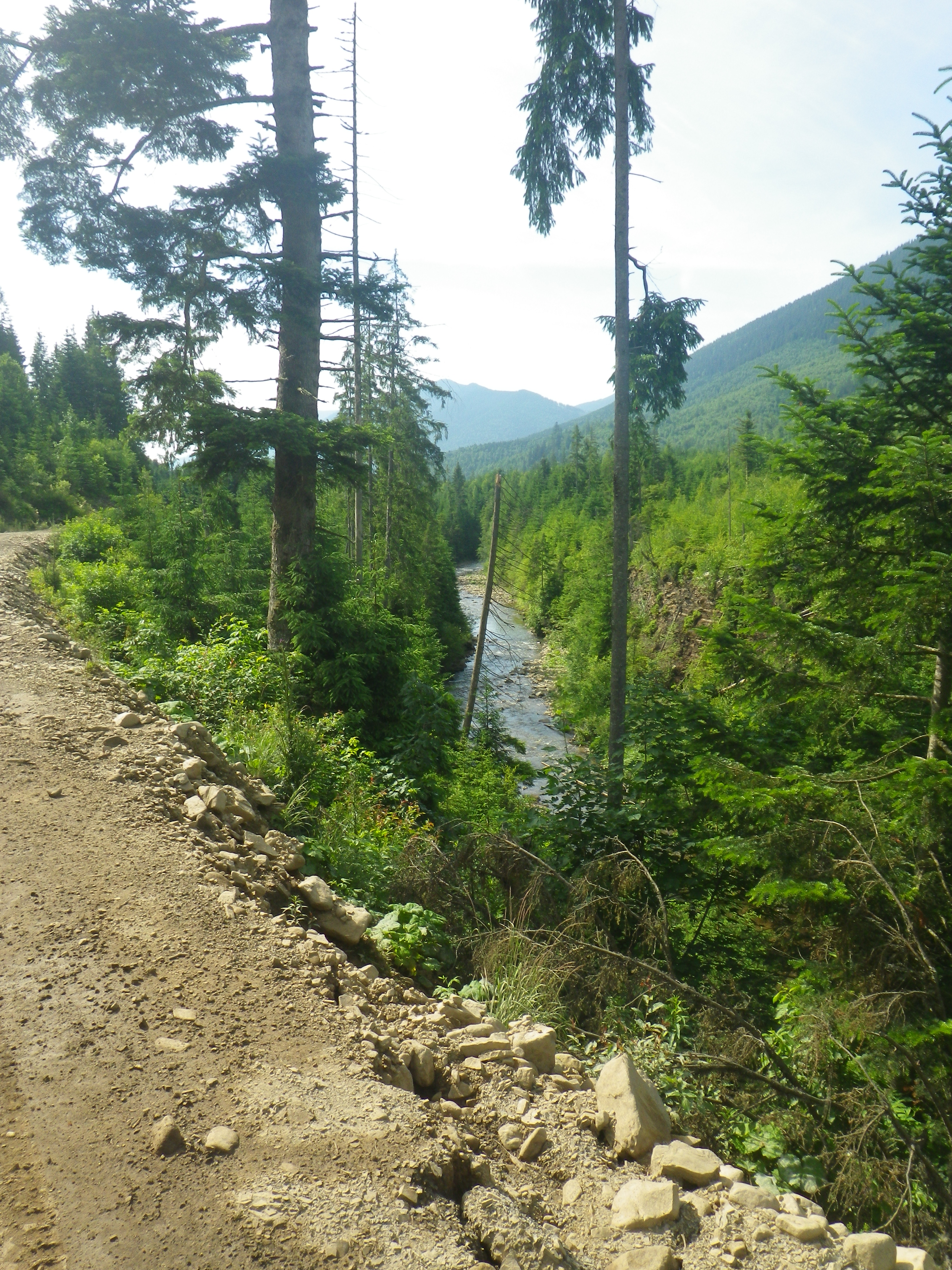 р. Мшана